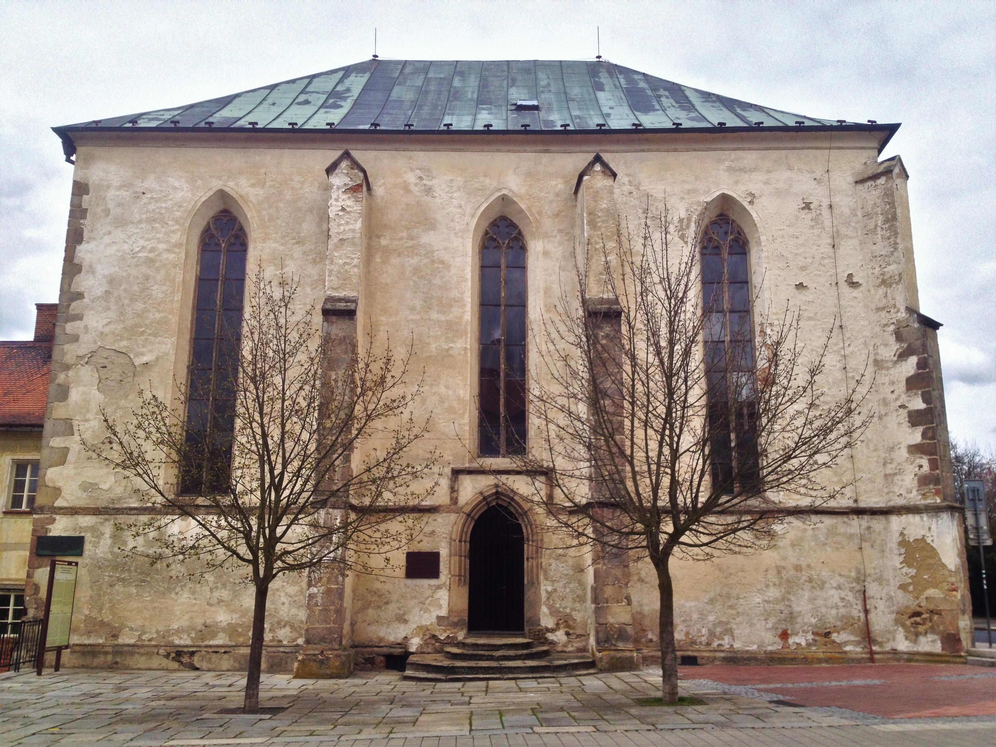 jizni pruceli